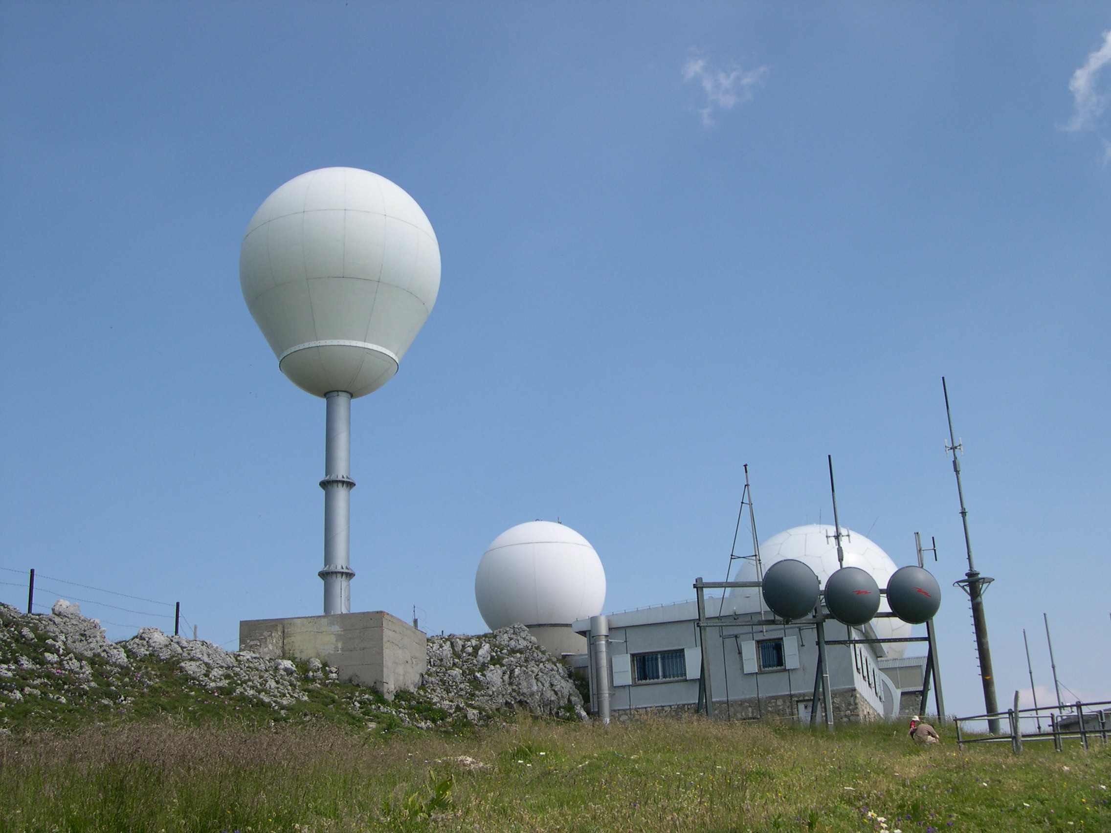 Photograph of radar and other electronic installations on La Dôle, Jura mountains, Switzerland. Vue sur les radars implantés au sommet de La Dôle, 1677 m, dans le Jura vaudois en Suisse. Applications: aviation civile et météo.